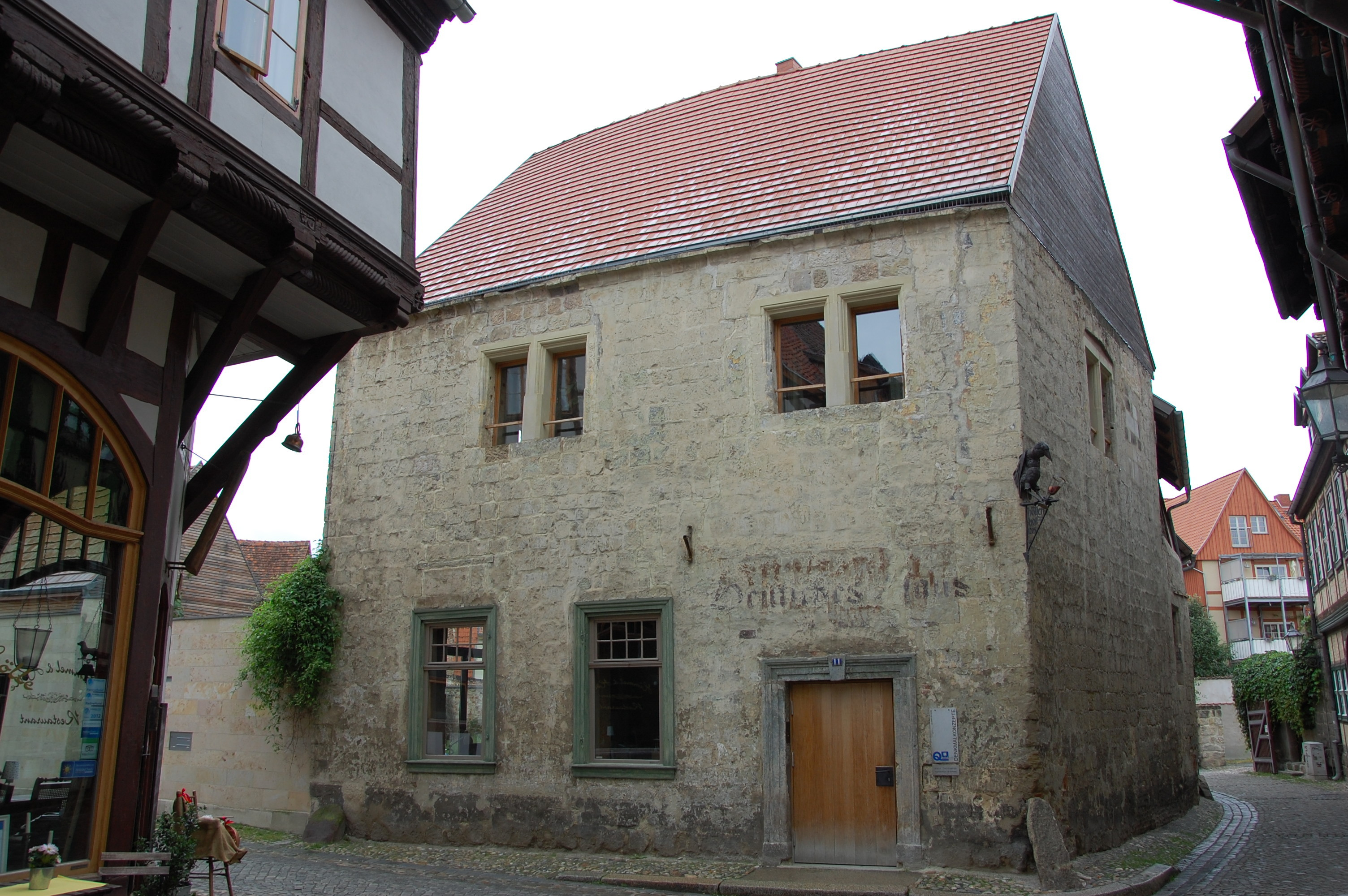 Haus Hölle 11 in Quedlinburg